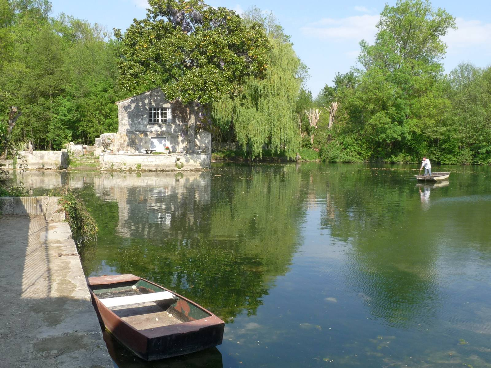 La Charente à Saintonge, Saint-Même-les-Carrières (16), France